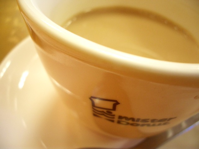 ミスドにてcafe au lait